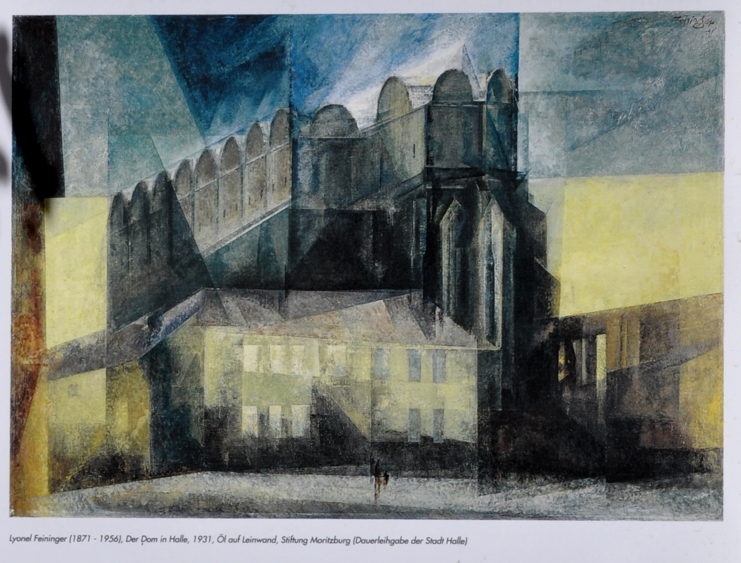 Halle (Saale), Informationstafel beim Halleschen Dom, Detail: Lyonel Feininger, Dom in Halle